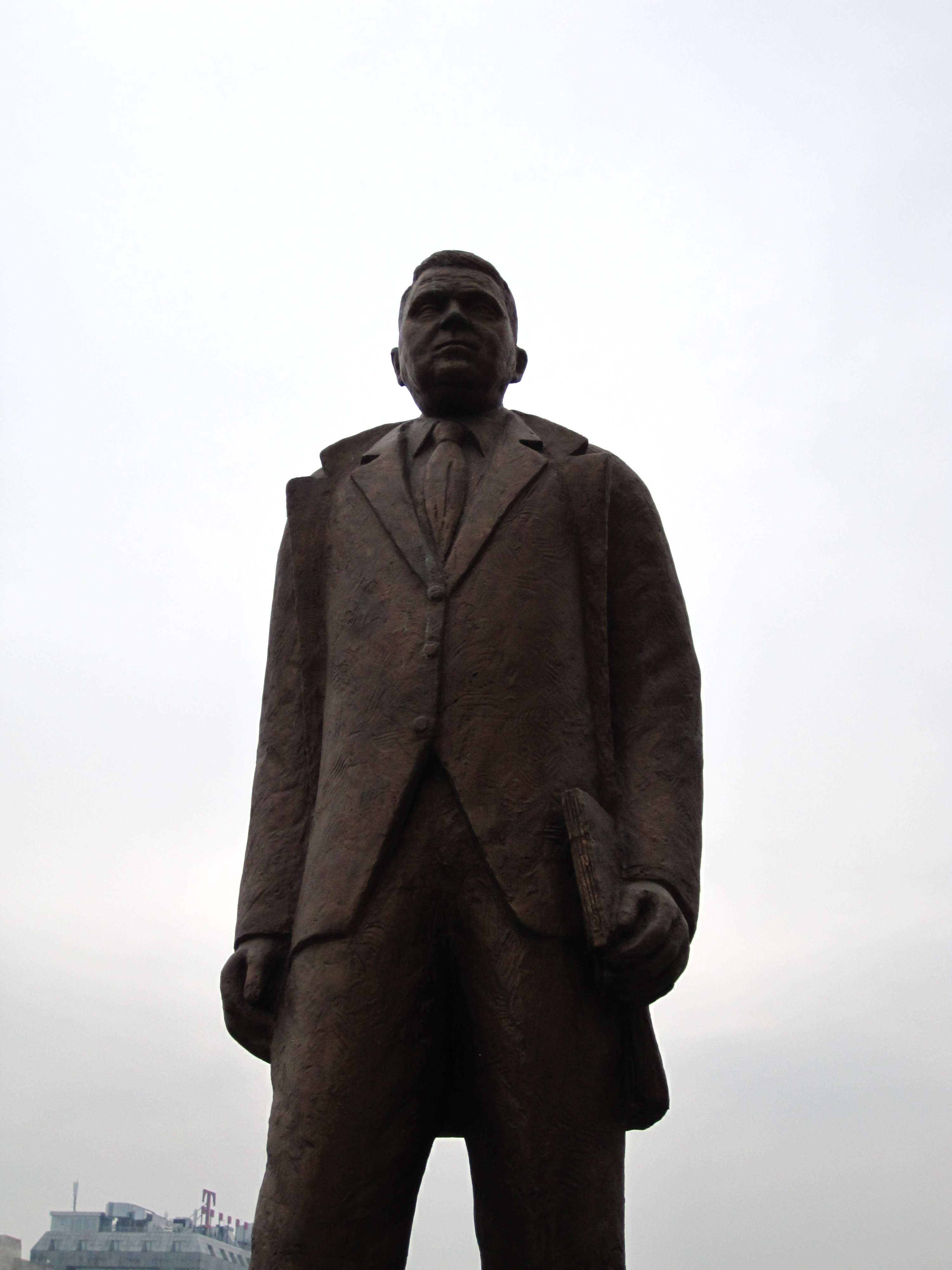 Споменик - Стале Попов во Скопје.